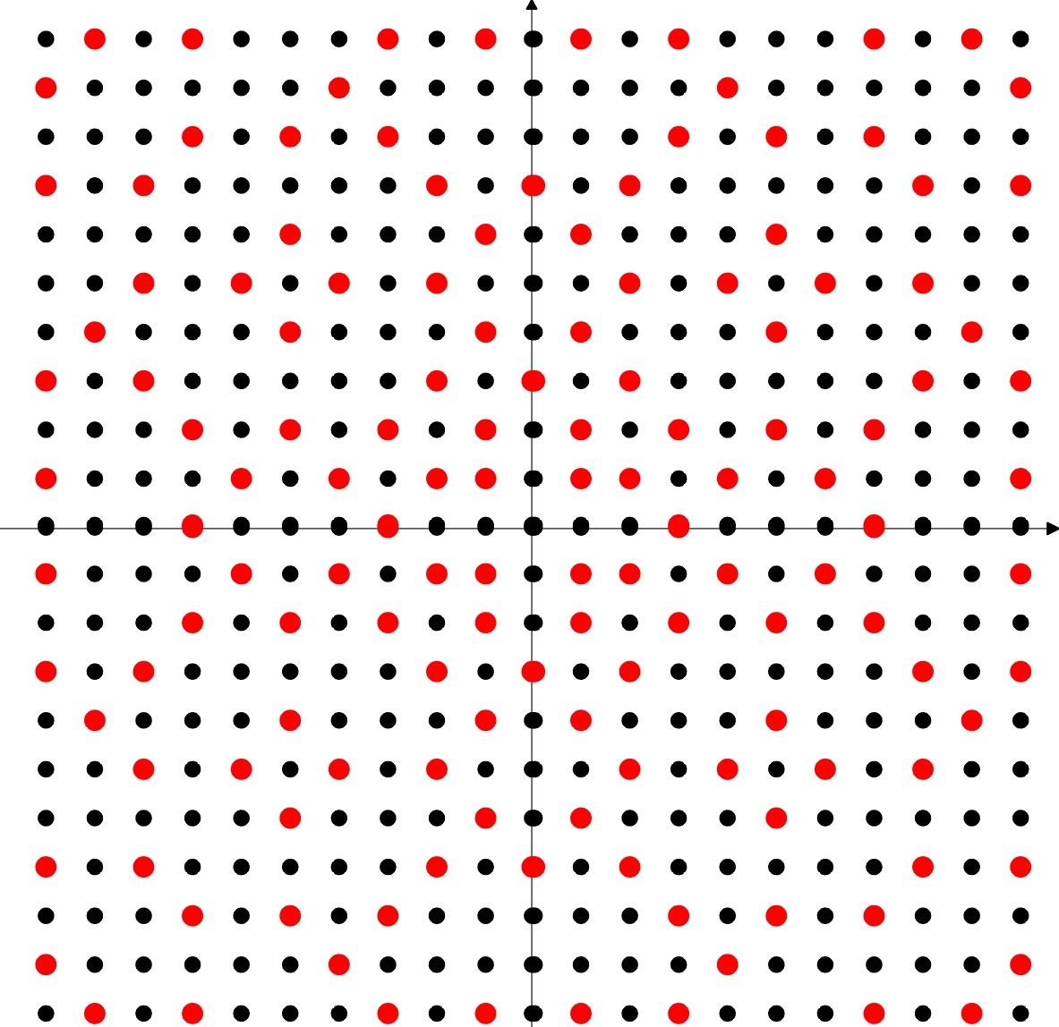 Rappresentazione degli interi di Gauss sul piano complesso. In rosso sono indicati i primi di Gauss.